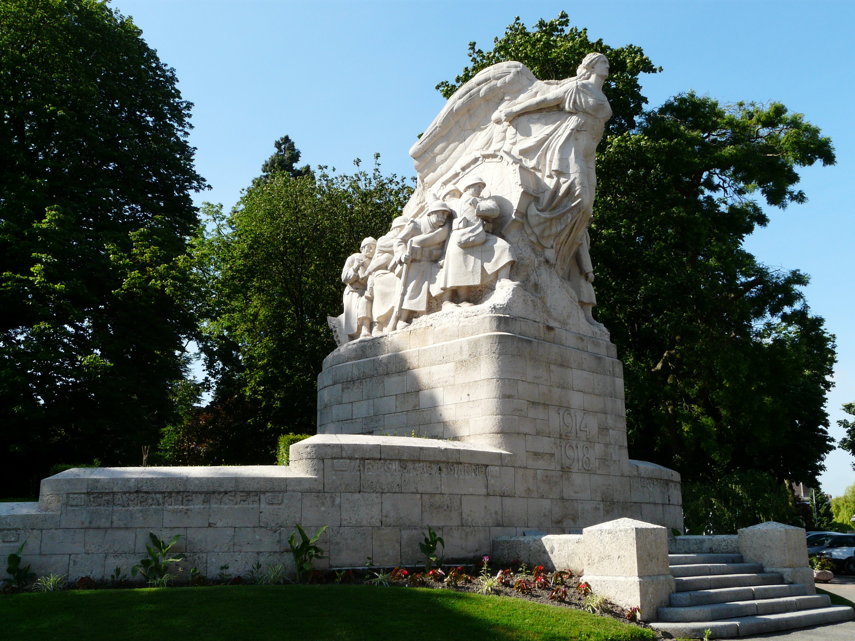 Monument aux morts de Cambrai